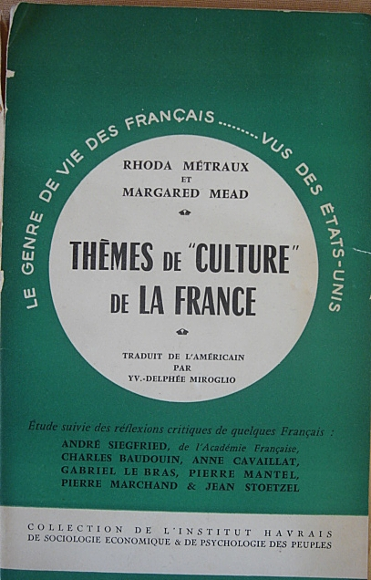 Couverture du livre de Margaret Mead et Rhoda Metraux, Themes de culture de la france